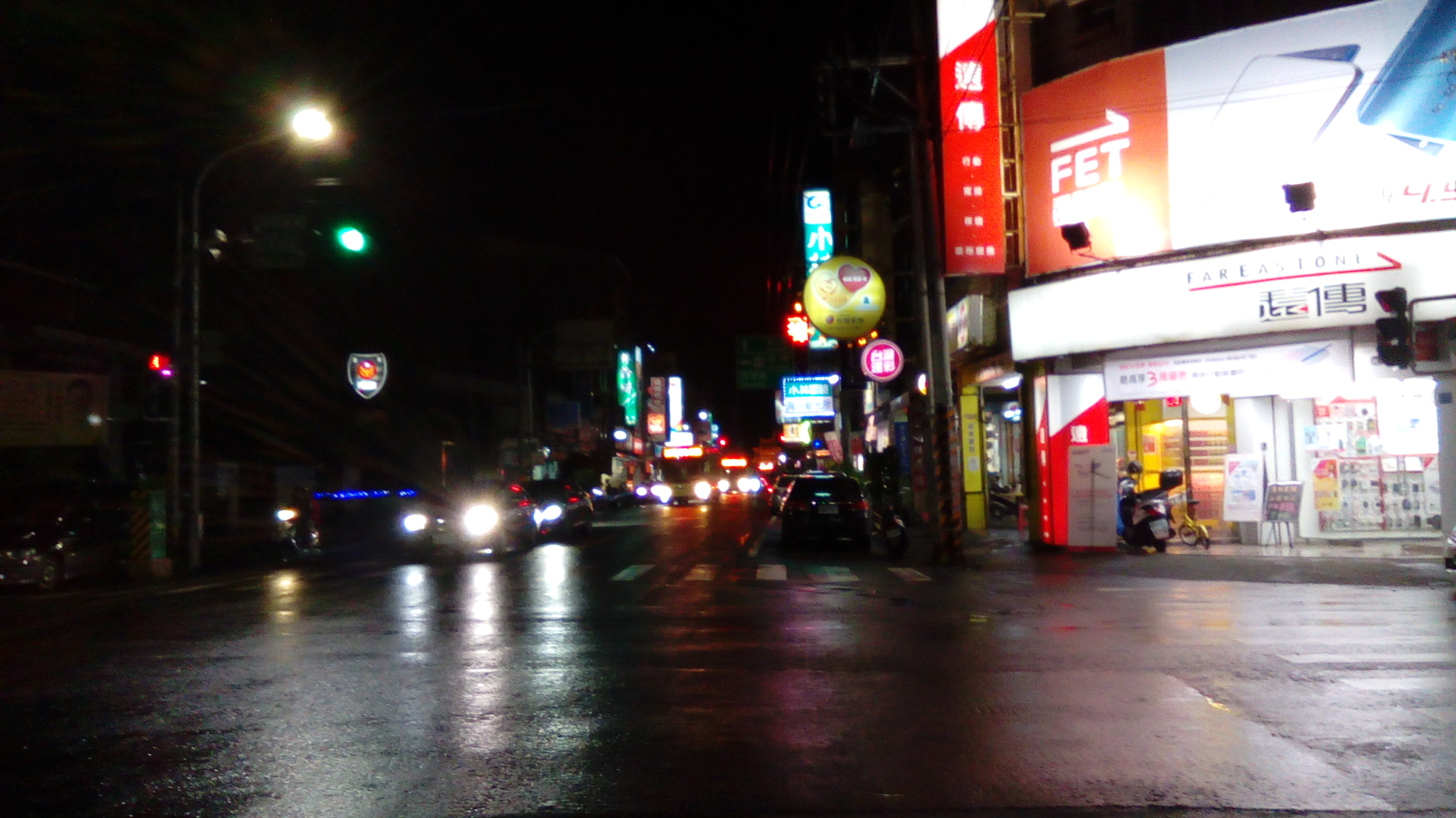 設於萬丹路一段(189縣道)